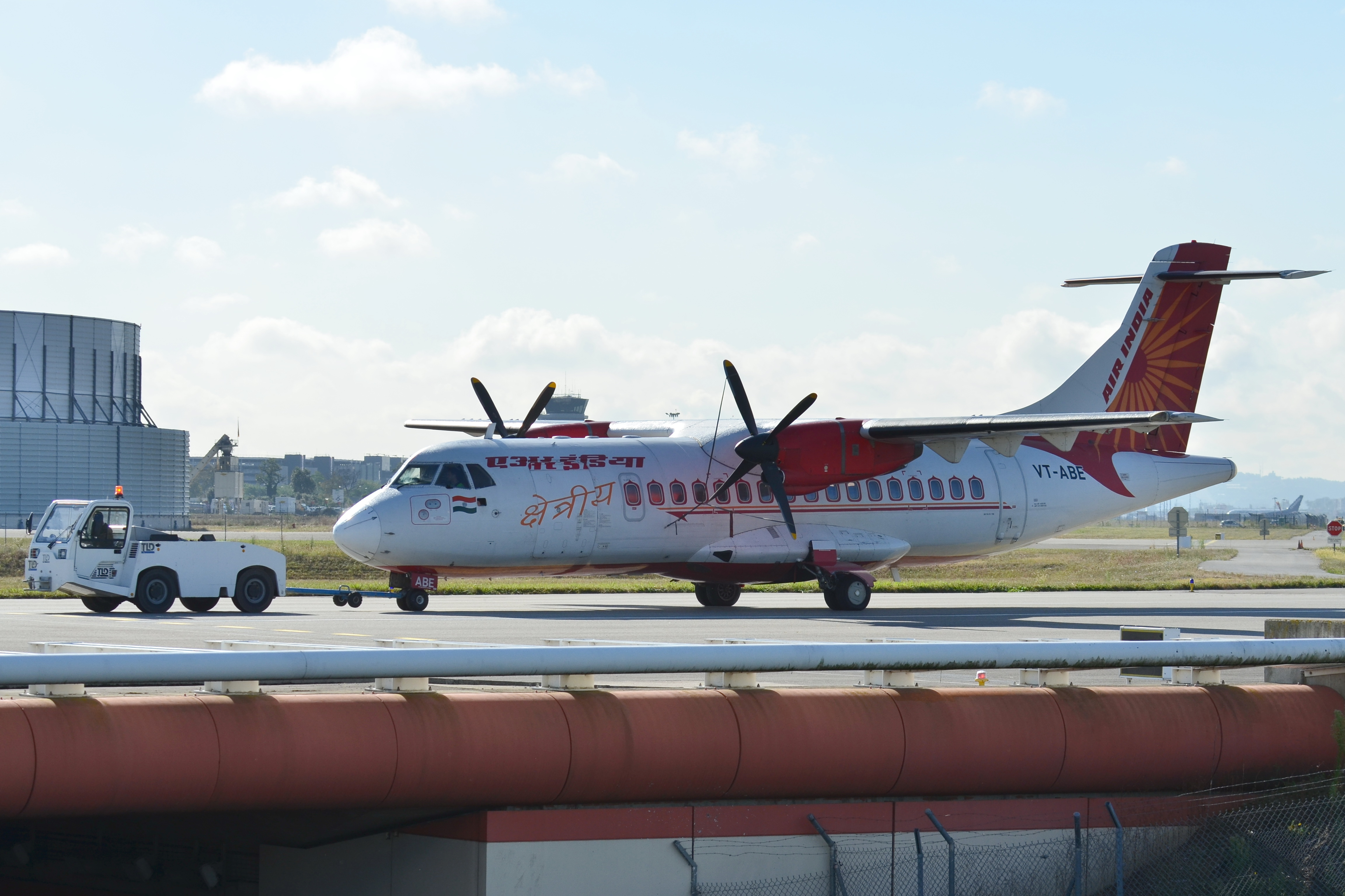 Photo prise à l'aéroport de Toulouse-Blagnac (LFBO) en France. Picture take at Toulouse-Blagnac Airport (LFBO) in France.